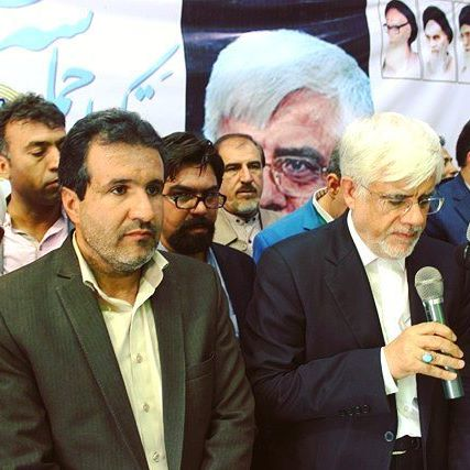 حمایت عارف از دکتر انصاری